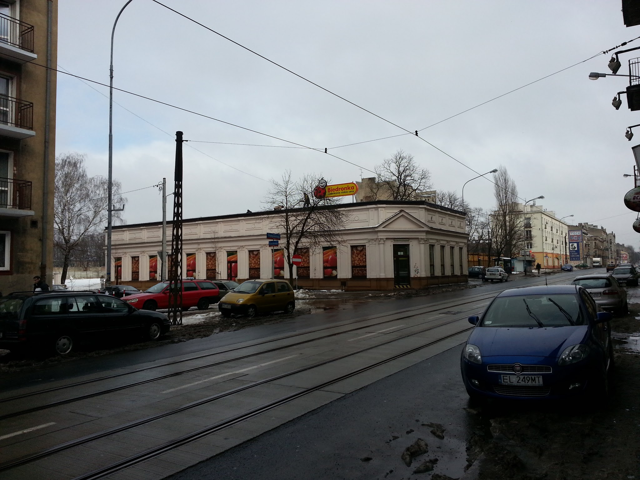 Budynek przy ul. Stanisława Przybyszewskiego 28 (róg ul. Brzozowej) w Łodzi. Obecnie mieści się tu supermarket Biedronka.